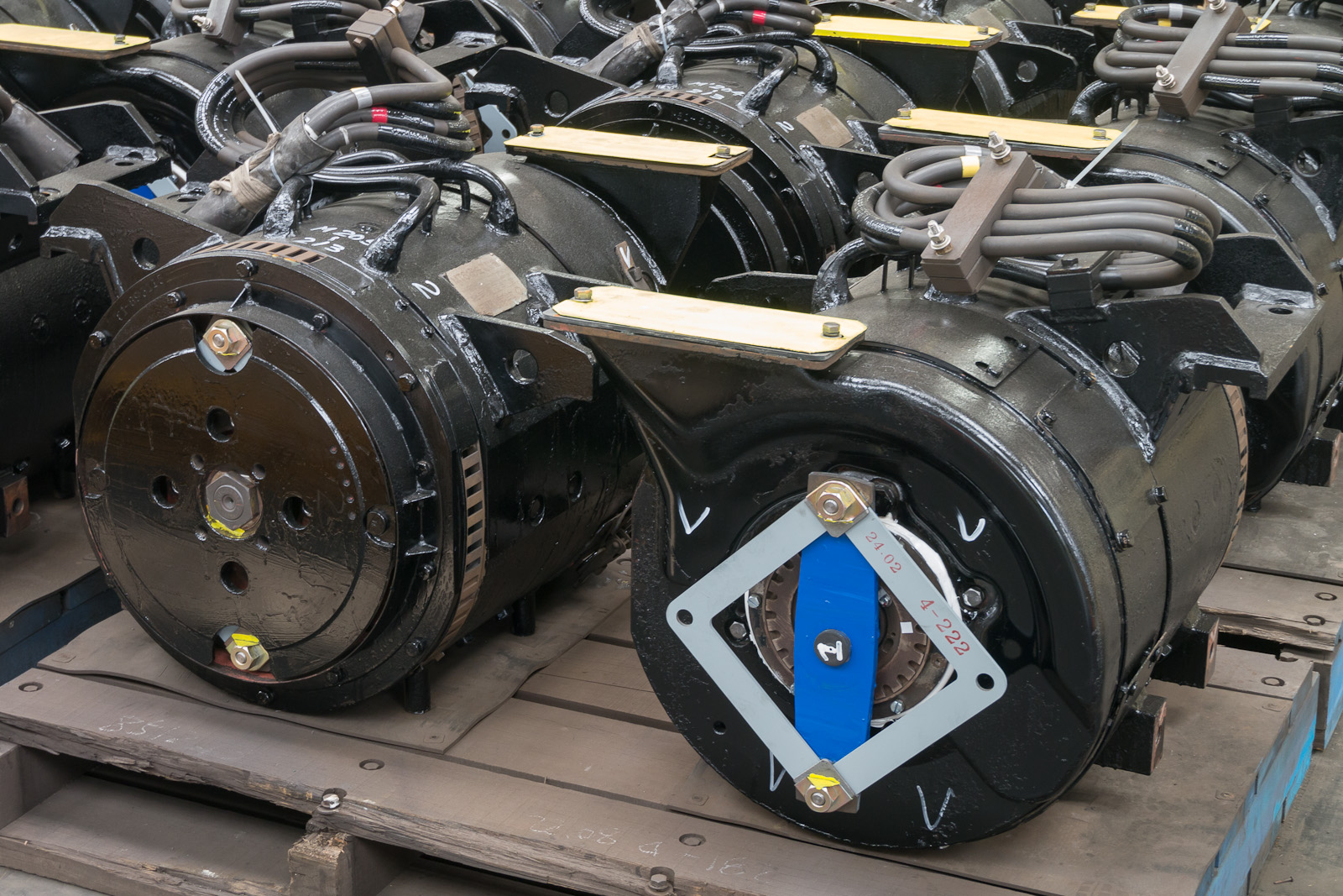 JR東日本205系MT61形主電動機（直流直巻電動機）。中空軸平行カルダン駆動用主電動機。